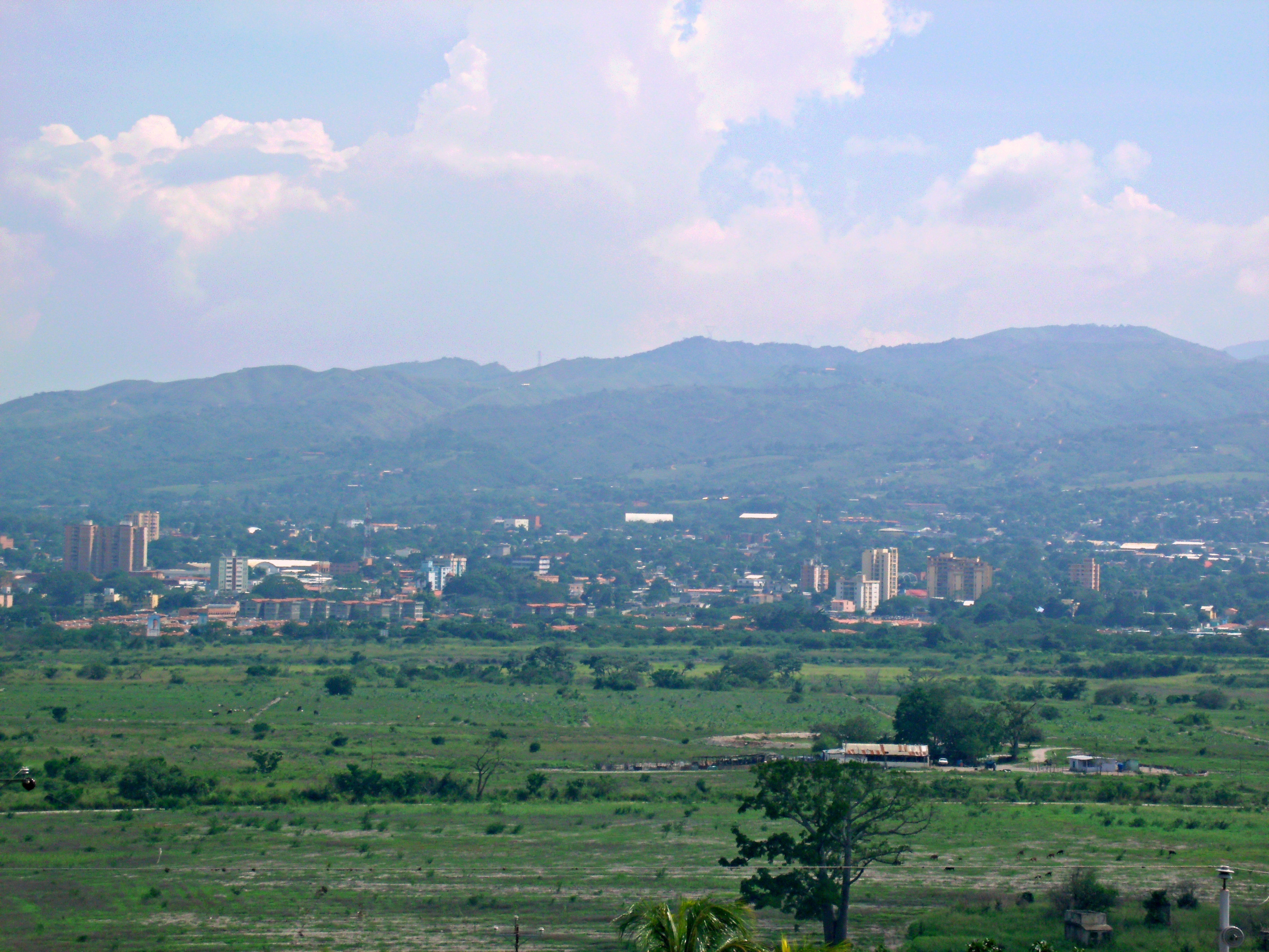 Valle del Turbio y Cabudare vistos desde el mirador de Santa Rosa. Barquisimeto, Venezuela.